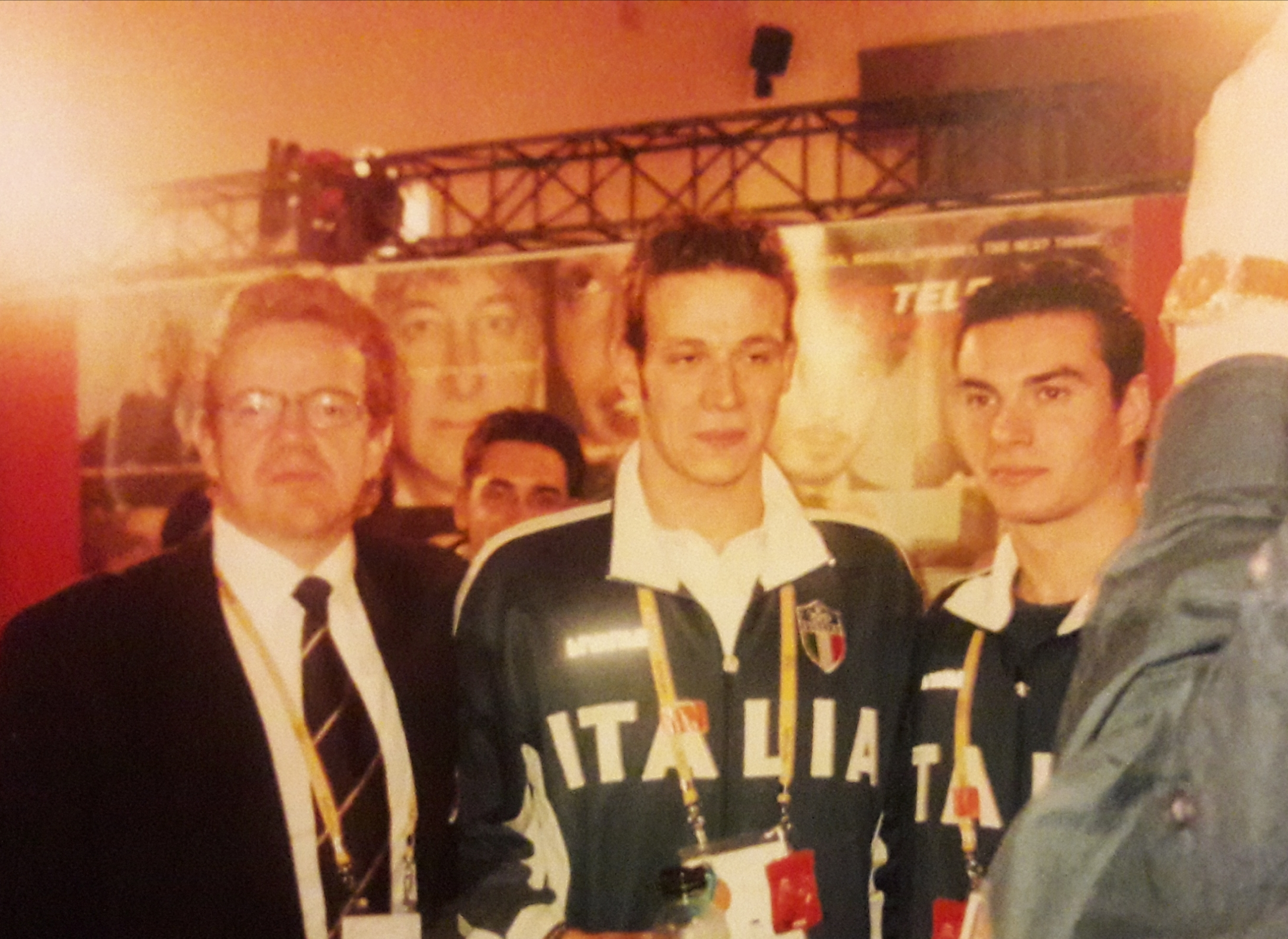 Domenico Fioravanti , 2 Ori Olimpici e Davide Rummolo , 1 Bronzo Olimpico a Sydney 2000 con il Commissario straordinario C.O.N.I. della Federazione Nuoto , Avvocato dello Stato Aurelio Vessichelli